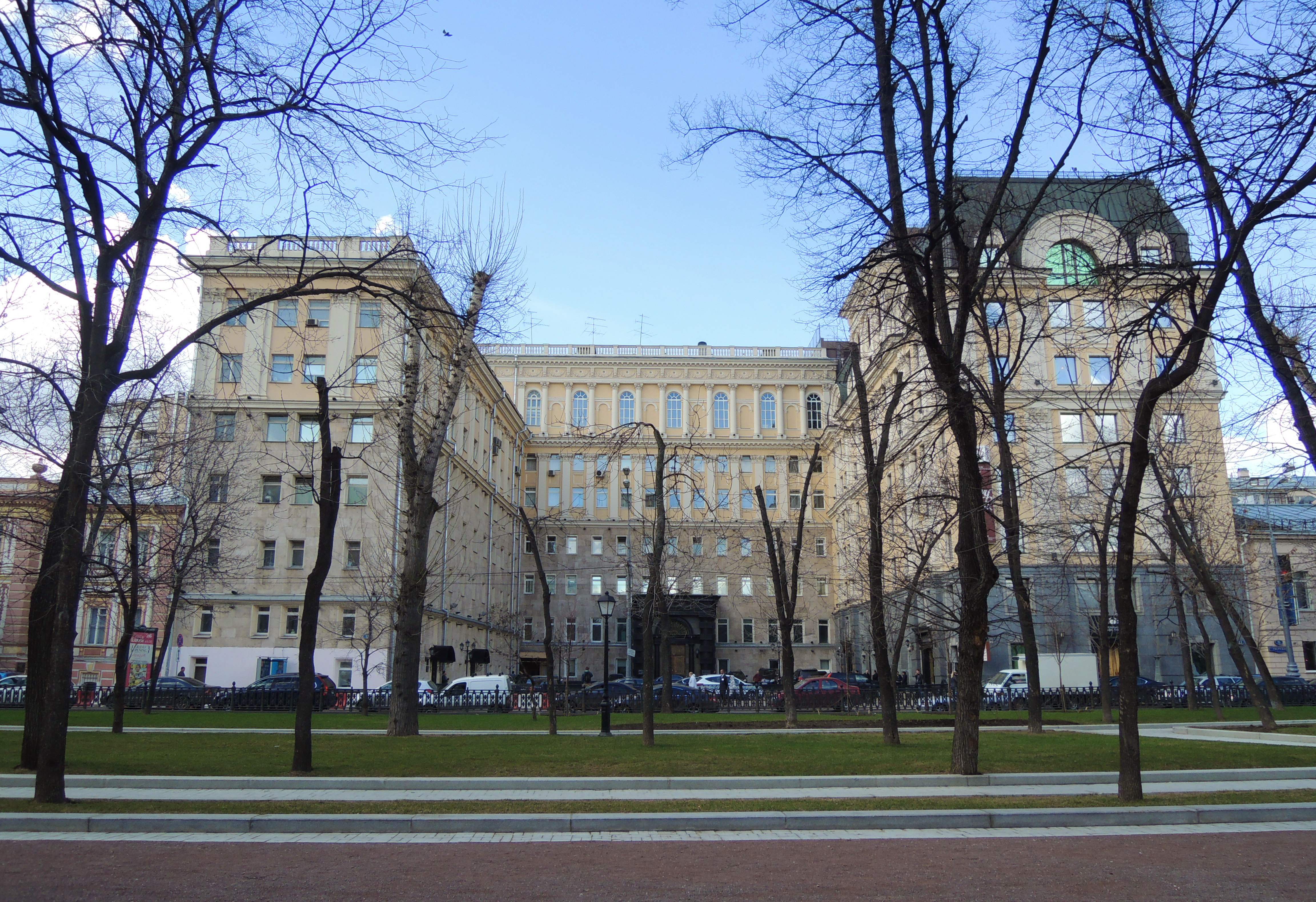 Тверской бульвар. № 13 стр.1